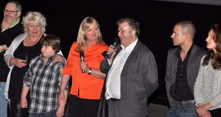 Avant-première du film Mince alors !.